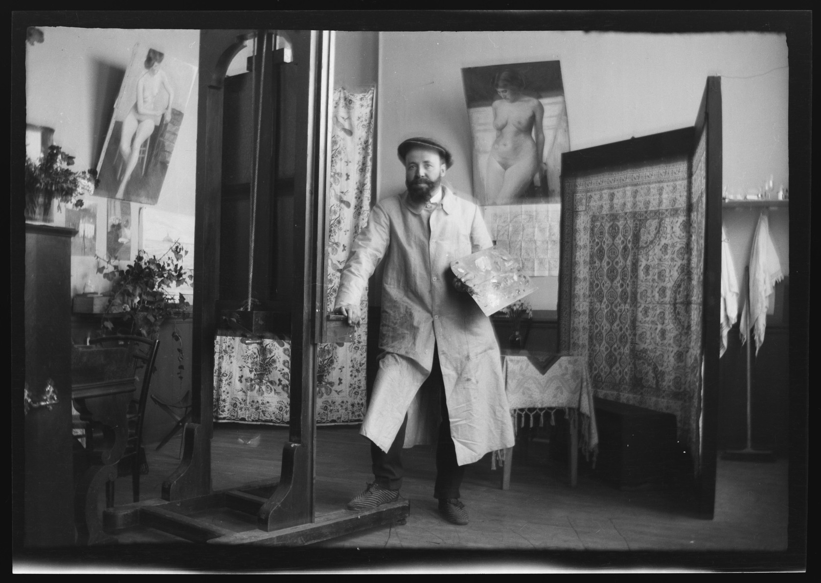 HS Ateljeer 12 valokuvafilmi, selluloosanitraatti, leveys 82 mm, korkeus 55 mm Asiasanat: valokuvat, Simberg, Hugo, taiteilijan ateljee, Rue Caulaincourt 65, Pariisi, ateljeet, interiööri, taiteilija, seisova mies, parta, viikset, kokovartalokuva, asu pitkä työtakki, päähine, kädessä paletti, vieressä staflia(lempinimi "giljotiini"), takana seinäke, päällä tekstiili, seinillä taiteilijan maalaus(2, alaston nainen), piano, matkat Hugo Simbergin jäljillä - Kansallisgalleria, Hugo Simbergin arkisto